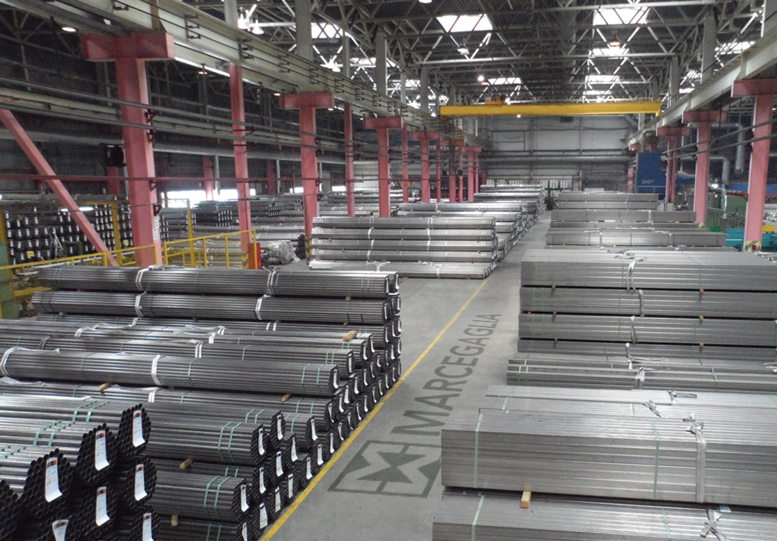 Нержавеющие трубы ООО "Марчегалия РУ"